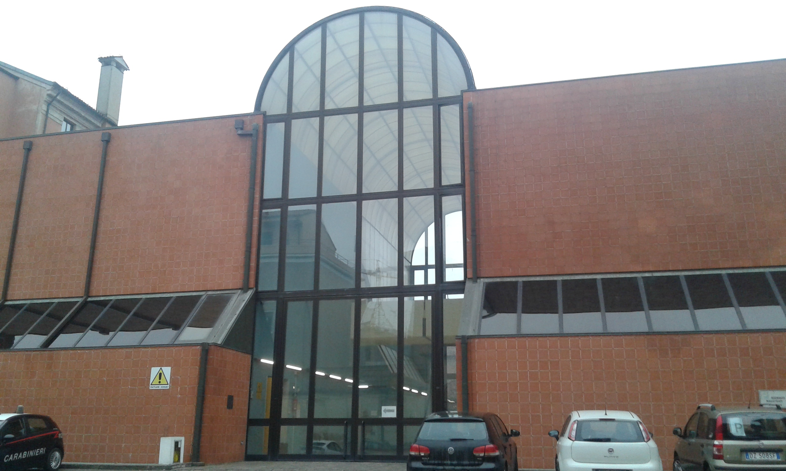 La galleria vetrata del palazzo di giustizia